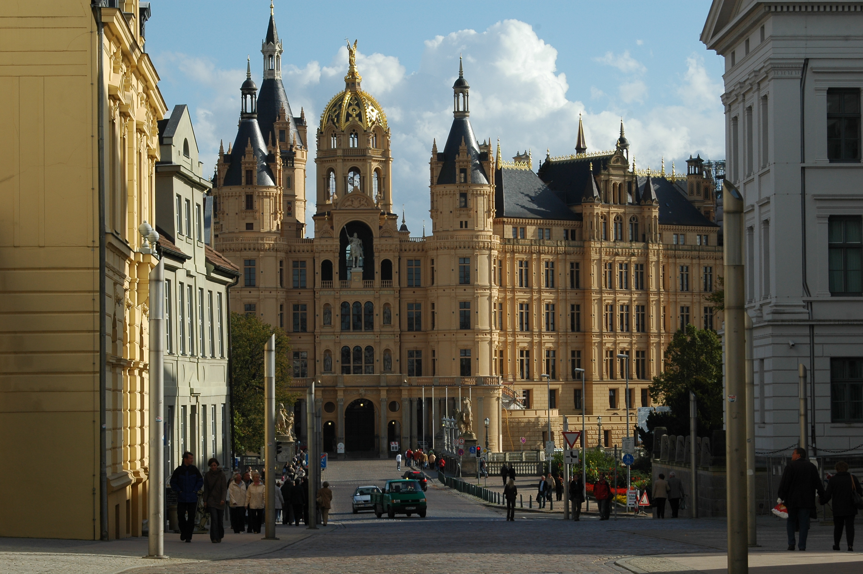 Schloss Schwerin, Landtag Mecklenburg-Vorpommern